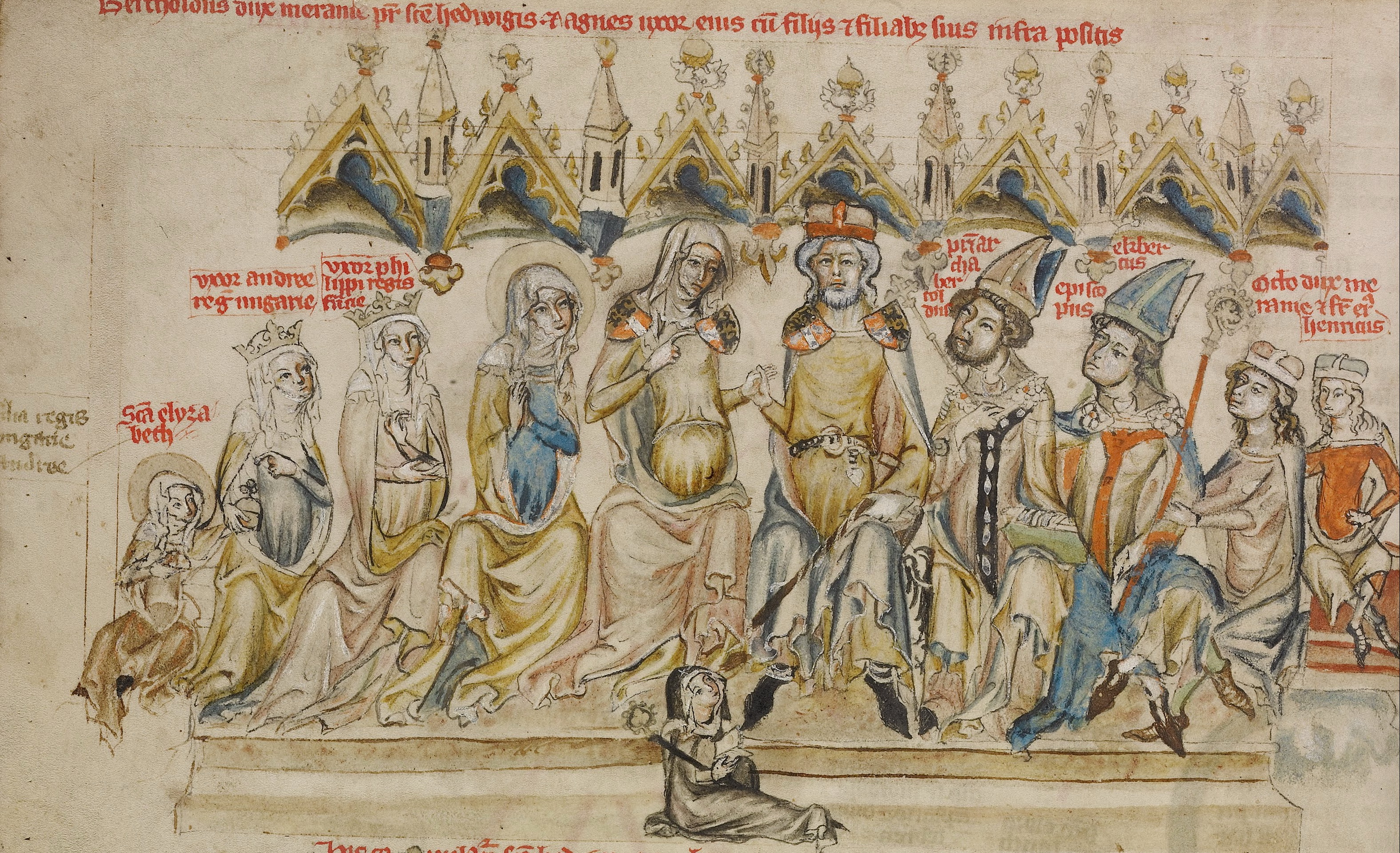 Andechsové - Anežka z Rochlitz s Bertoldem IV. a jejich děti - Otto I. z Andechsu, Ekbert-biskup v Bamberku, Jindřich- markrabě istrijský, Hedvika- slezská vévodkyně, Gertruda Meránská- uh. královna, Anežka Meránská- fr. královna, Berthold- patriarcha akvilejský, Matilda- abatyše z Klitzingen a sv. Alžběta Uherská